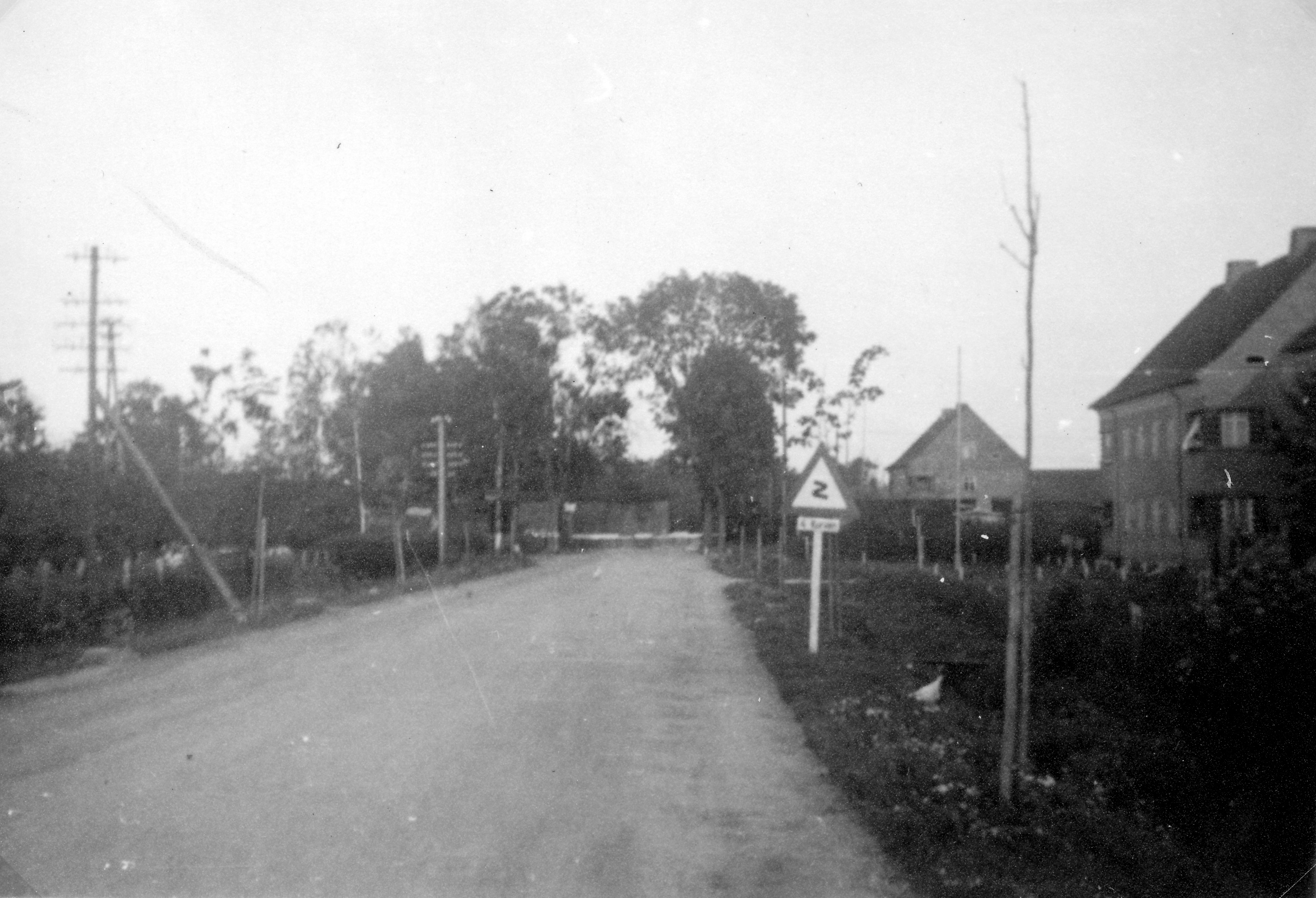 Grünheide (Kreis Insterburg) 1939, Dorfstraße, westlich der Bahnlinie mit Siedlungshäusern rechts Koordinaten des Standortes: 54°48'10.23N 21°53'55.10O Kaluschskoje (russisch Калужское, deutsch Grünheide, Kreis Insterburg, litauisch Gryneidė) ist ein Ort in der russischen Oblast Kaliningrad im Rajon Tschernjachowsk.